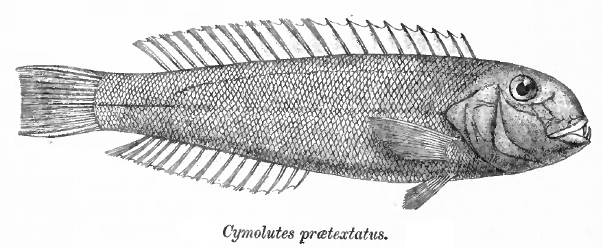 Cymolutes prætextatus = Cymolutes praetextatus (Quoy & Gaimard, 1834)